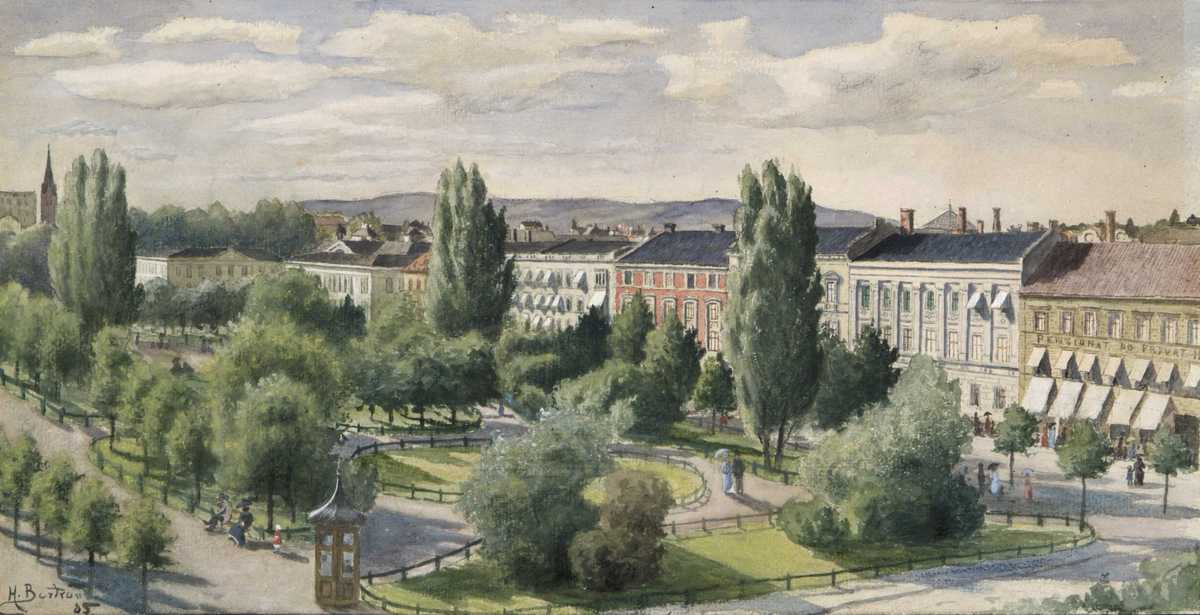 Bertrand (Hansen), Harald: Bymotiv. Studenterlunden og Karl Johans gate